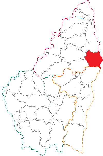 Situation du canton dans le département de l'Ardèche (France)